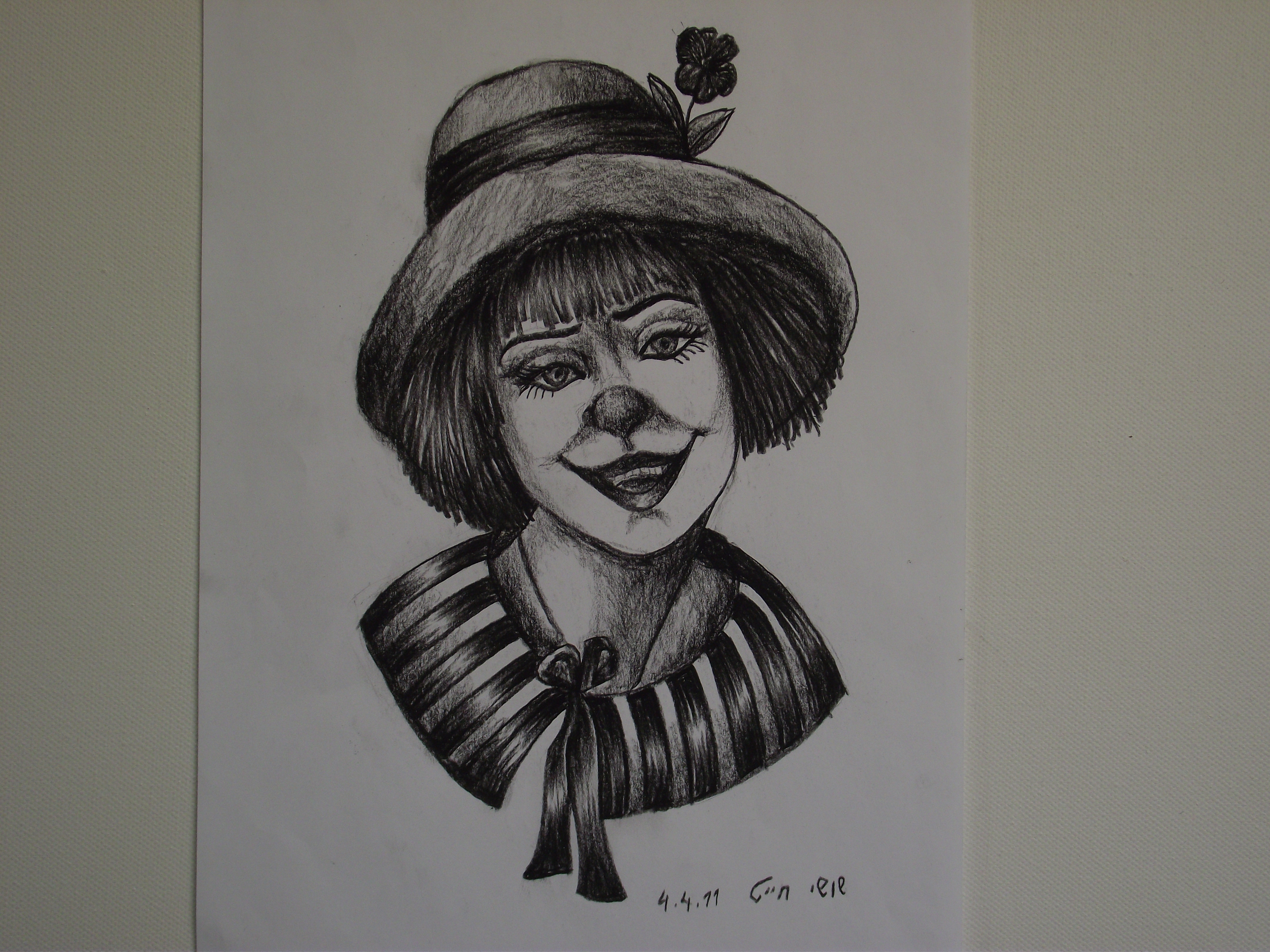 הליצנית. הציור האחרון שיצרה שושי חייט